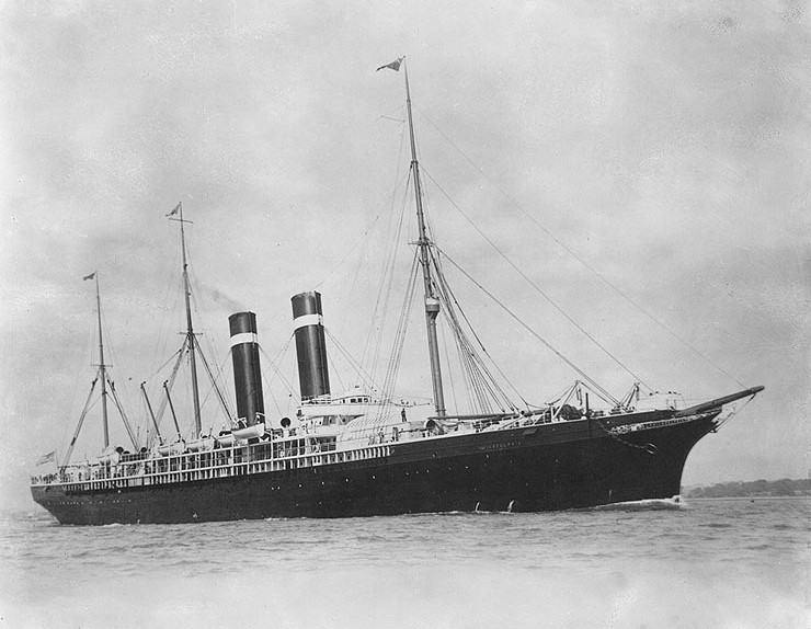 客船「シティ・オブ・パリ」